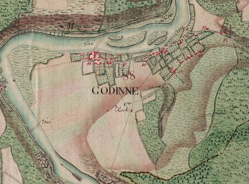 La carte de Ferraris est une carte historique des Pays-Bas autrichiens établie entre 1770 et 1778. Il s'agit de la première cartographie systématique et à grande échelle, aussi bien en « Belgique » que dans toute l'Europe occidentale. On y voit ici un extrait de Godinne.